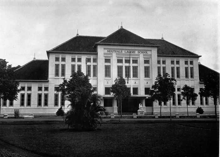 Foto. De neutrale lagere school te Malang.